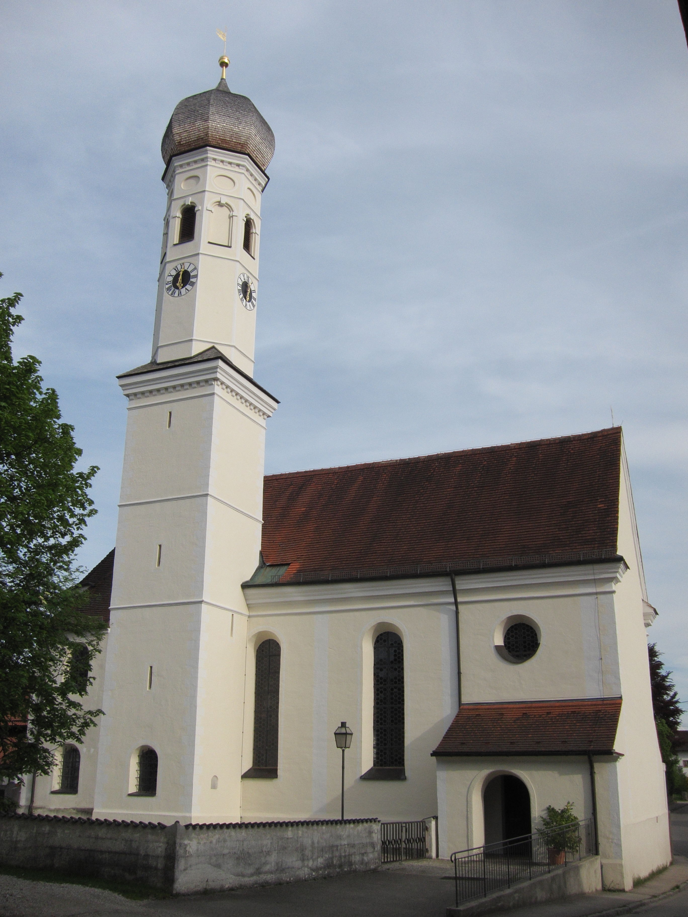 Straußdorf, Grafinger Str. 4; Pfarrkirche, Barockbau, 1698 von Thomas Mayr; mit Ausstattung.